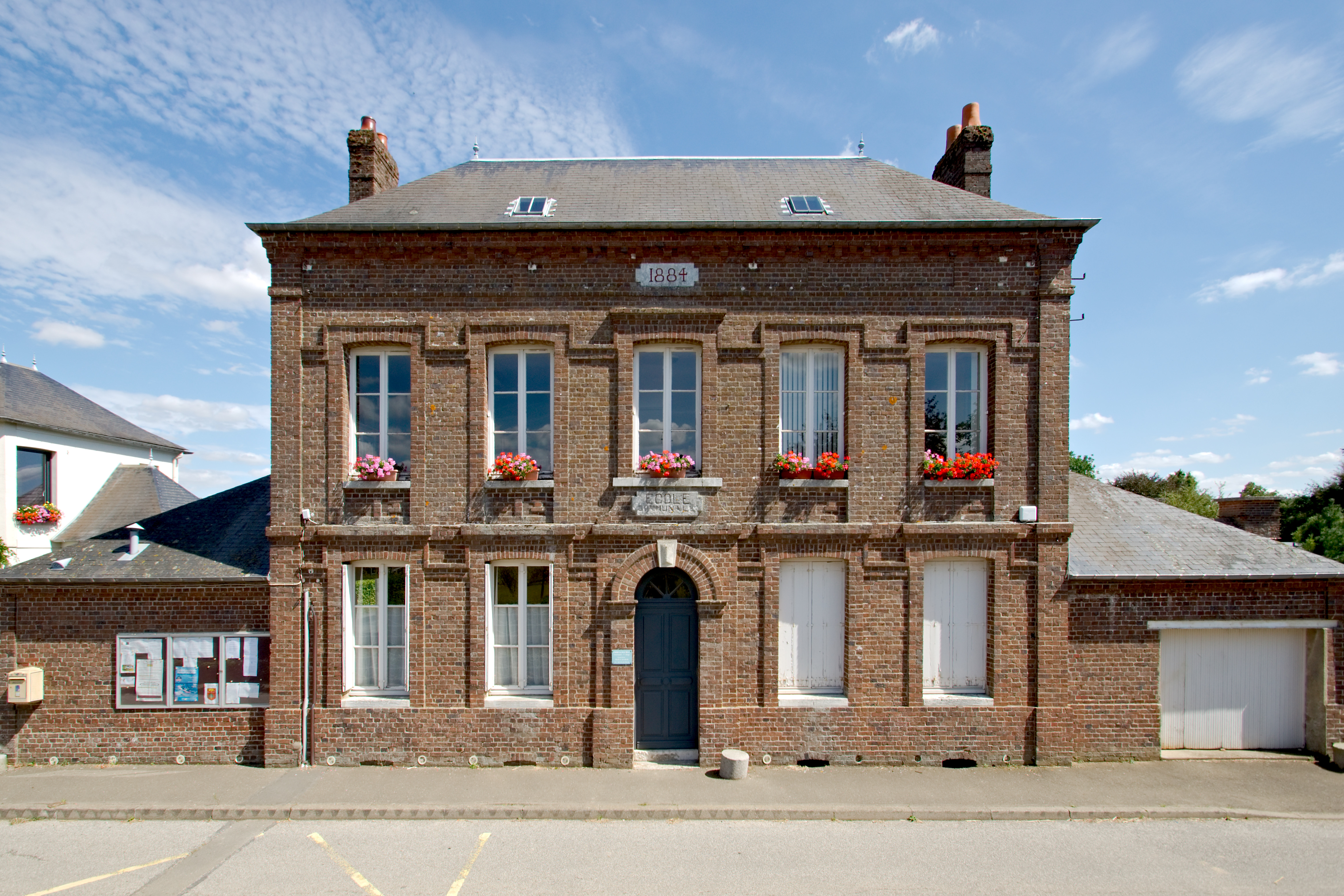 École communale (1884) de Bois-l’Évêque, rue Principale